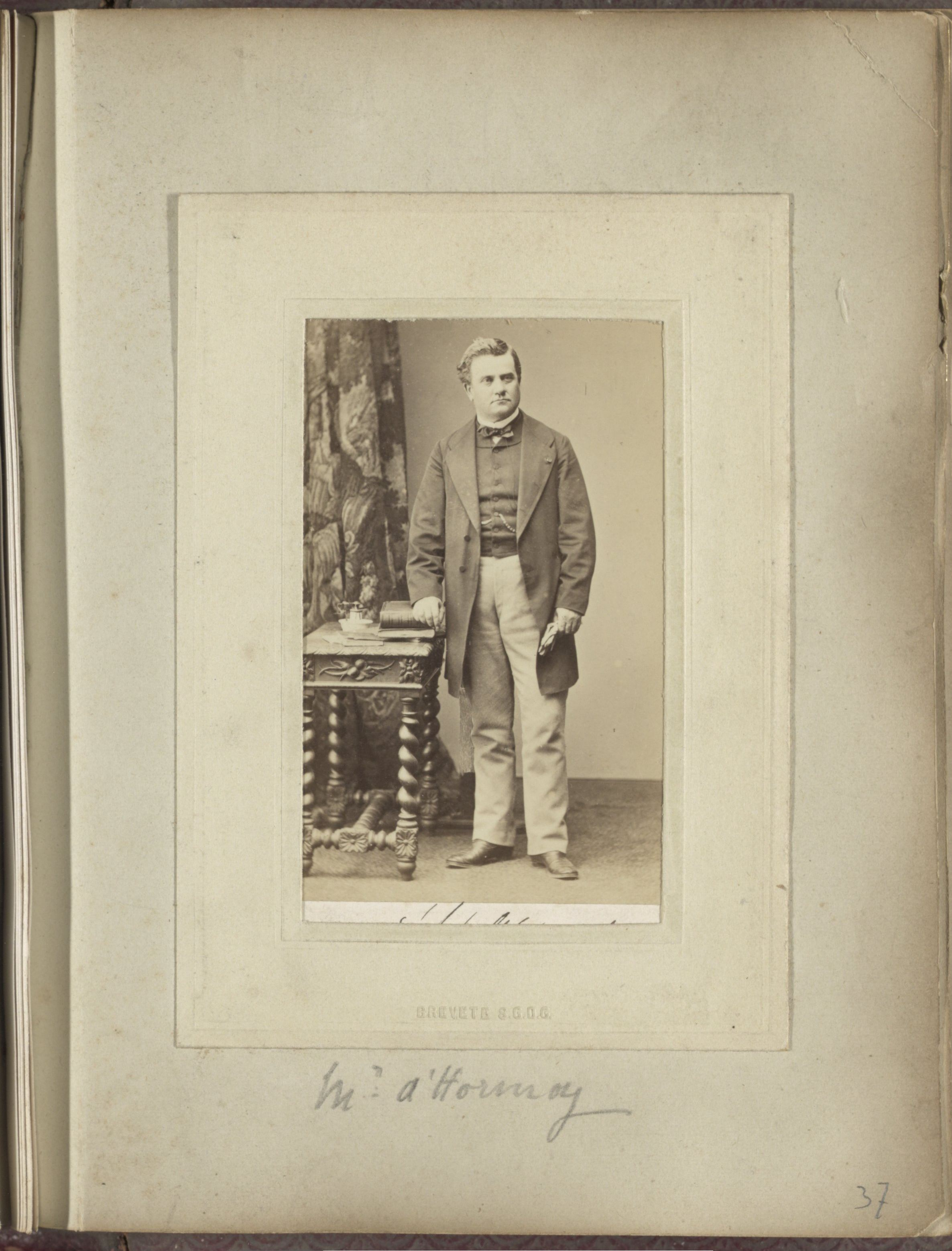 IdentificatieTitel(s): Portret van de heer D'Hornoyd'Hornoy (titel op object)Objecttype: foto carte-de-visite Objectnummer: RP-F-1999-158-37Opschriften / Merken: naam, recto, handgeschreven: ‘Mr. d'Hornoy’adres, verso: ‘Boulevt. Montmartre 10 Paris’Omschrijving: Onderdeel van Fotoalbum met 48 cartes-de-visite aangeboden aan maarschalk graaf De Castellane.VervaardigingVervaardiger: fotograaf: Alexandre KenPlaats vervaardiging: ParijsDatering: ca. 1860 - ca. 1865Fysieke kenmerken: albuminedrukMateriaal: karton papier fotopapier Techniek: albuminedrukAfmetingen: foto: h 93 mm × b 56 mmkarton: h 107 mm × b 65 mmOnderwerpWat: historical personsstudio requisites ~ photographertrousers, breechescoat, capeshoes, sandalsneck-gear ~ clothinghairdressbookWaar: ParijsVerwerving en rechtenVerwerving: aankoop 1999Copyright: Publiek domein